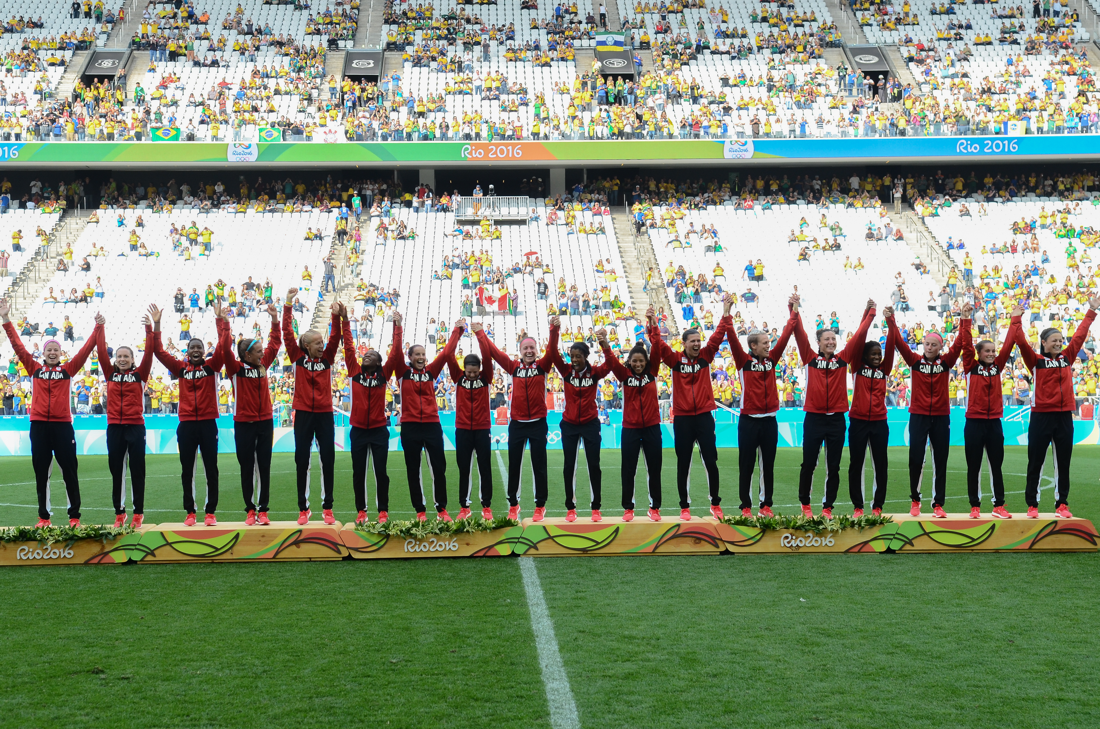 São Paulo - Canadá vence o Brasil por 2 a 1 e fica com a medalha de bronze no futebol feminino dos Jogos Olímpicos, na Arena Corinthians (Rovena Rosa/Agência Brasil)